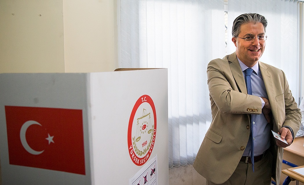 انتخابات ریاست جمهوری و پارلمانی ترکیه صبح يکشنبه ۲۷ خرداد ۱۳۹۷ با حضور رضا هاکان تکین سفیر ترکیه در تهران در محل سفارت ترکیه در تهران و سرکنسولگری‌های این کشور در ارومیه و تبریز برگزار شد.